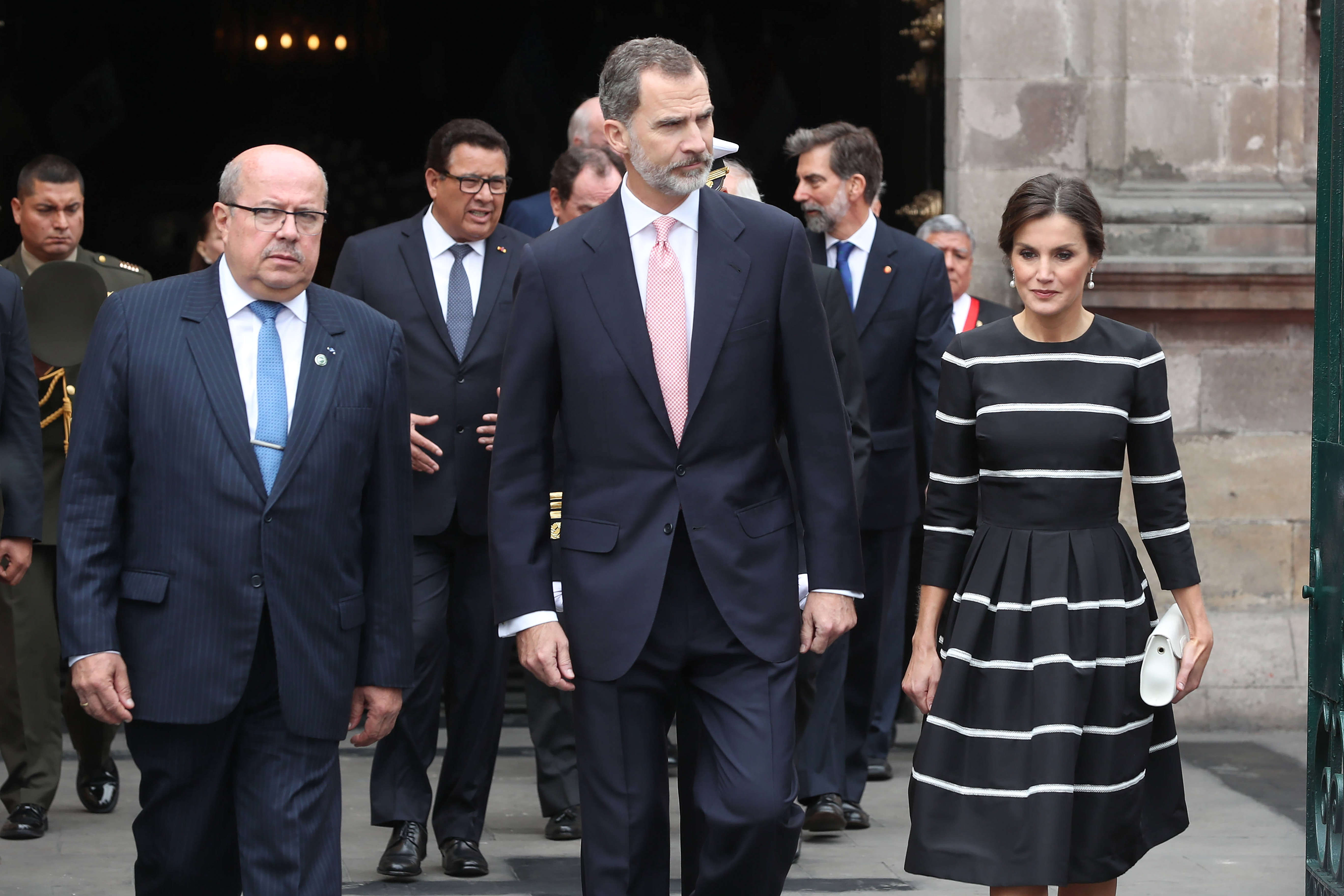 MINISTRO DE DEFENSA ACOMPAÑÓ A LOS REYES DE ESPAÑA EN EL PANTEÓN DE LOS PRÓCERES